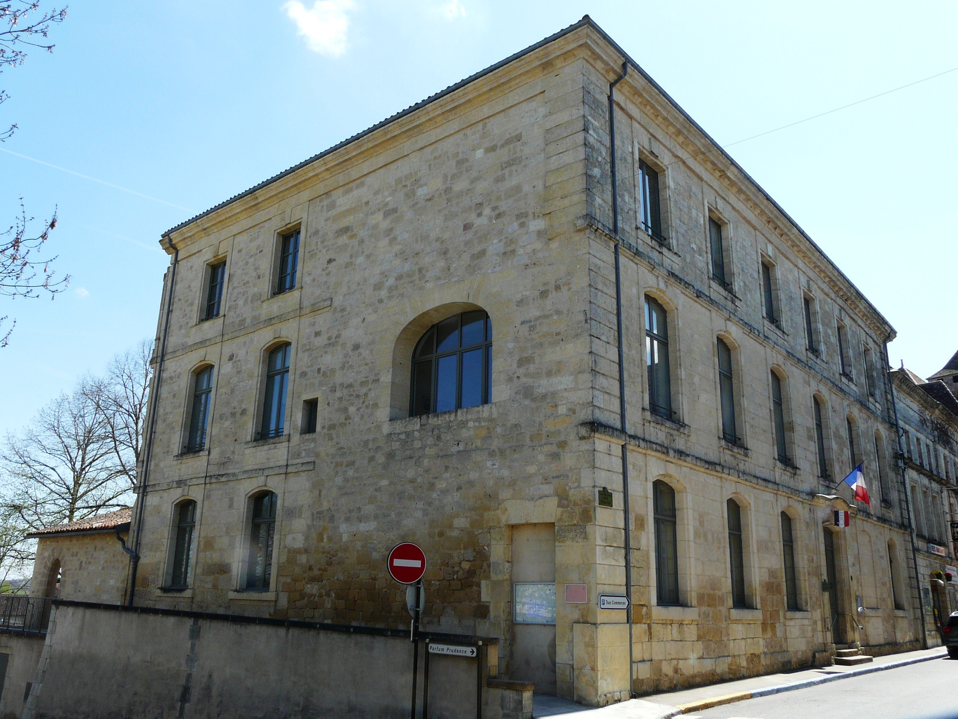 La mairie, rue Romieu, Beaumont-du-Périgord, Dordogne, France.